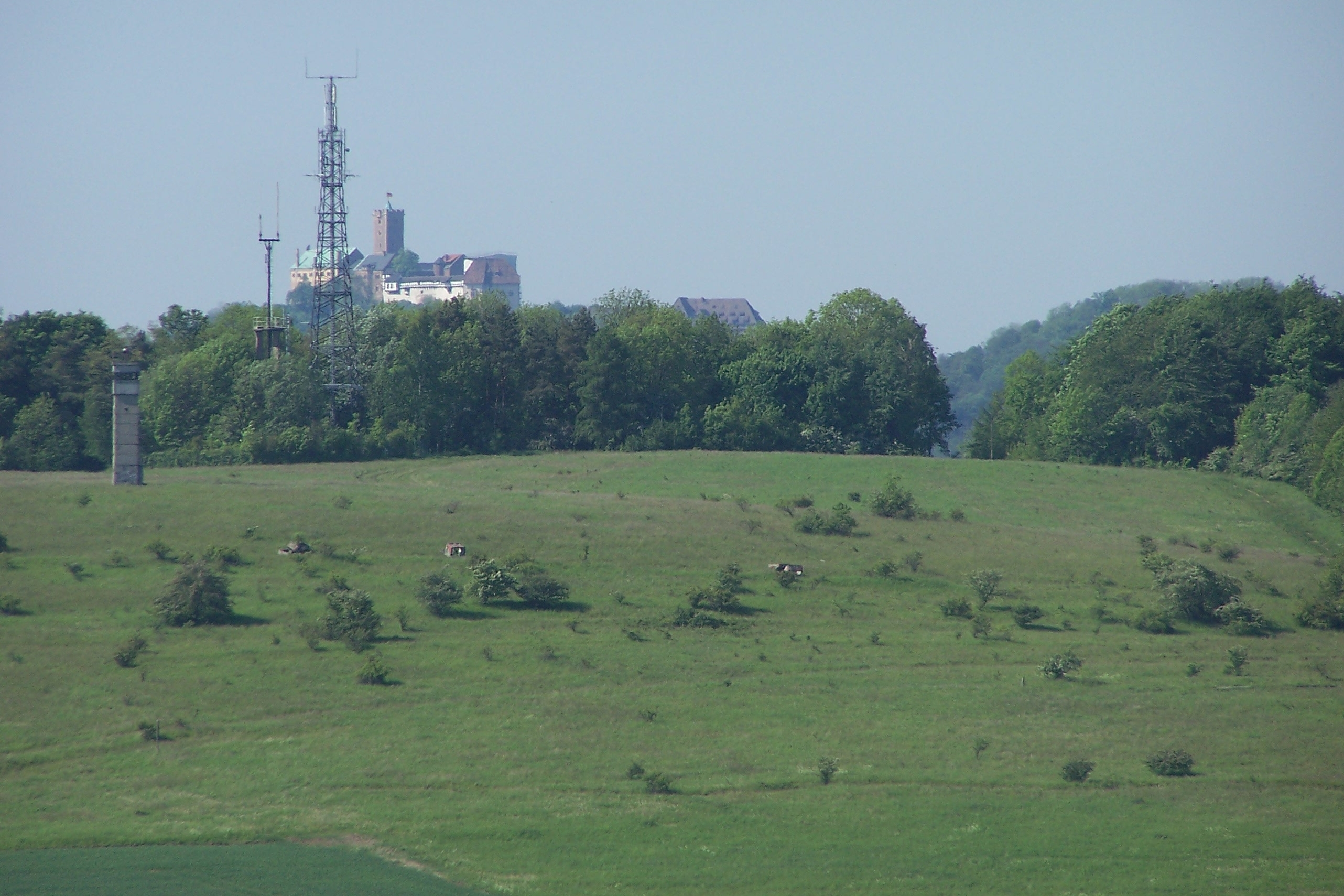 Ansicht des Wartenberges von Norden (Landsteit) - der Bismarckturm stand unmittelbar links neben der Schneise in der rechten Bildhälfte. Die Antennenmasten verdeutlichen die Höhe des Denkmals. Im Hintergrund grüßt die Wartburg.